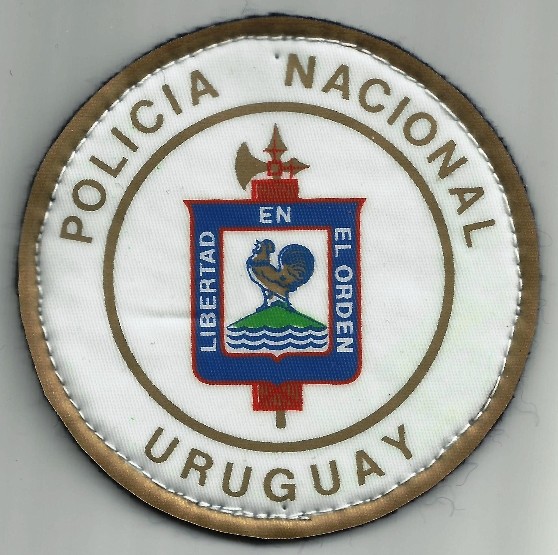 Politie embleem Uruguay